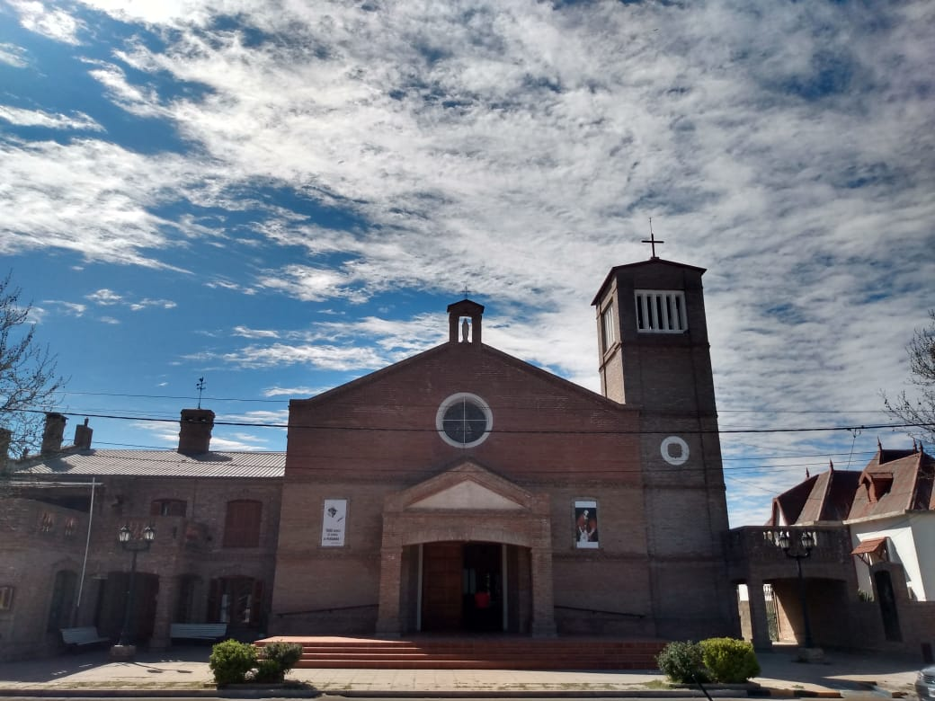 Parroquia Local de Realico